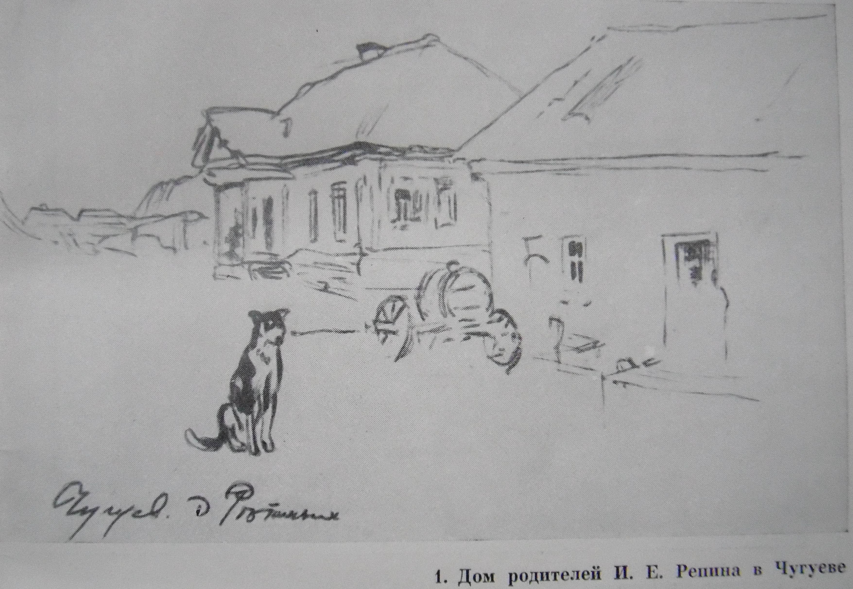 Чугуево. Дом родителей Репина И.Е.